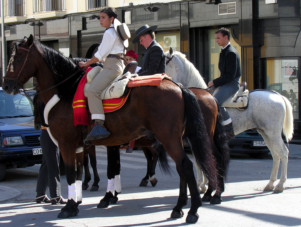 Feria de Baena, Córdoba, Andalucía, España